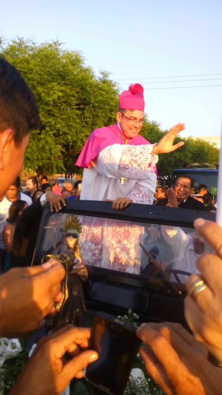 Dom Francisco de Assis Gabriel dos Santos, bispo da Diocese de Campo Maior, quando da sua chegada em Campo Maior em carro aberto